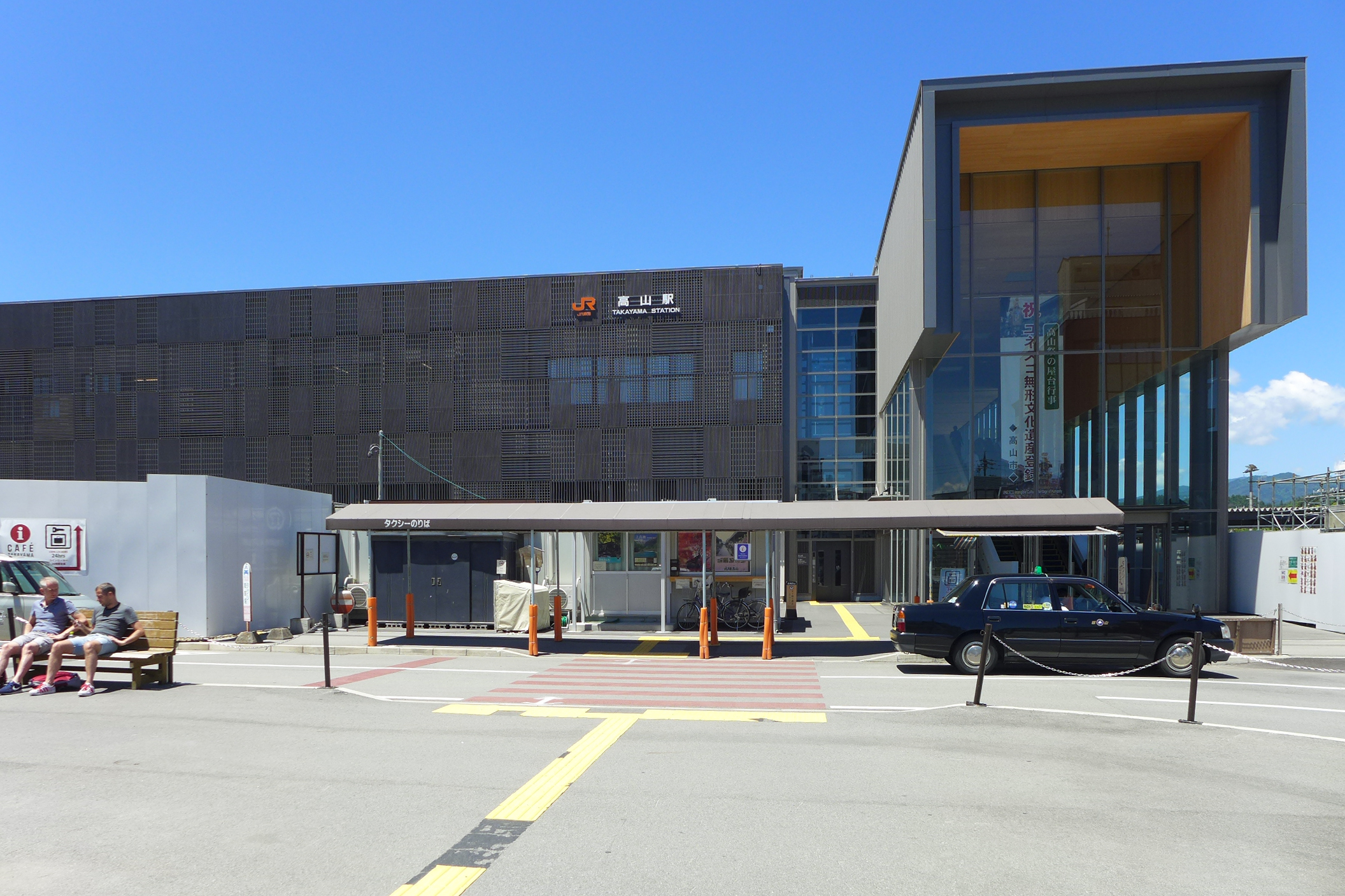 Takayama Station